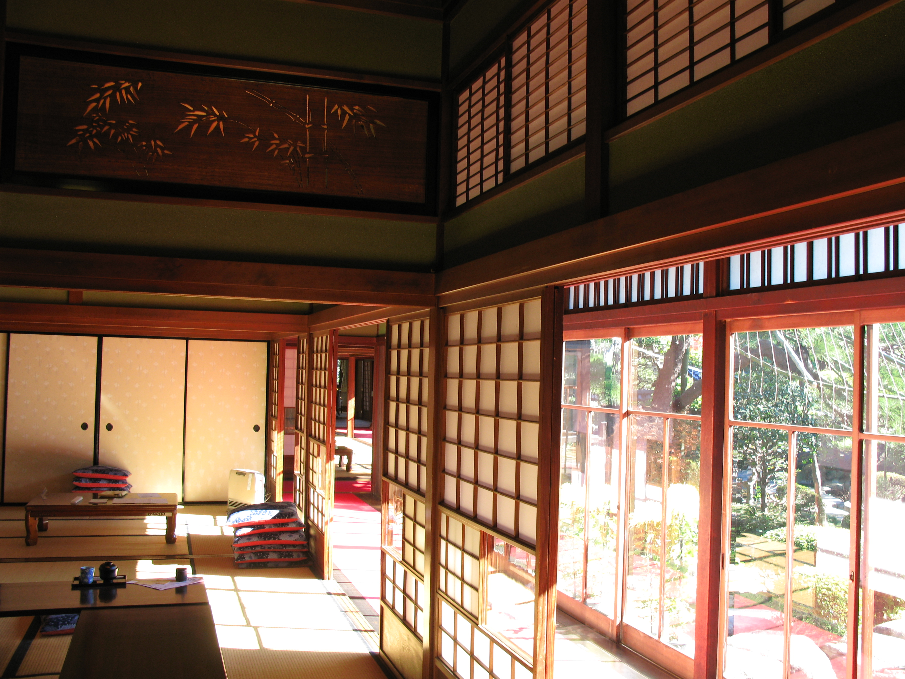 Yamamoto-tei, Shibamata Katsushika-ku Tokyo, Japan 葛飾・柴又 山本亭